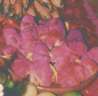 Pan de muertos de la Mixteca Poblana, en México. Se diferencia del pan de muerto más conocido en que tiene forma humana y se encuentra espolvoreado de azúcar roja.